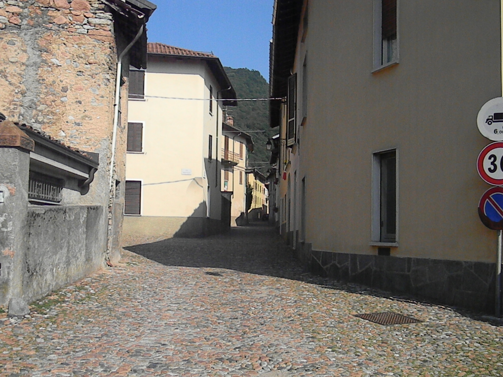 Via Roma, Brinzio